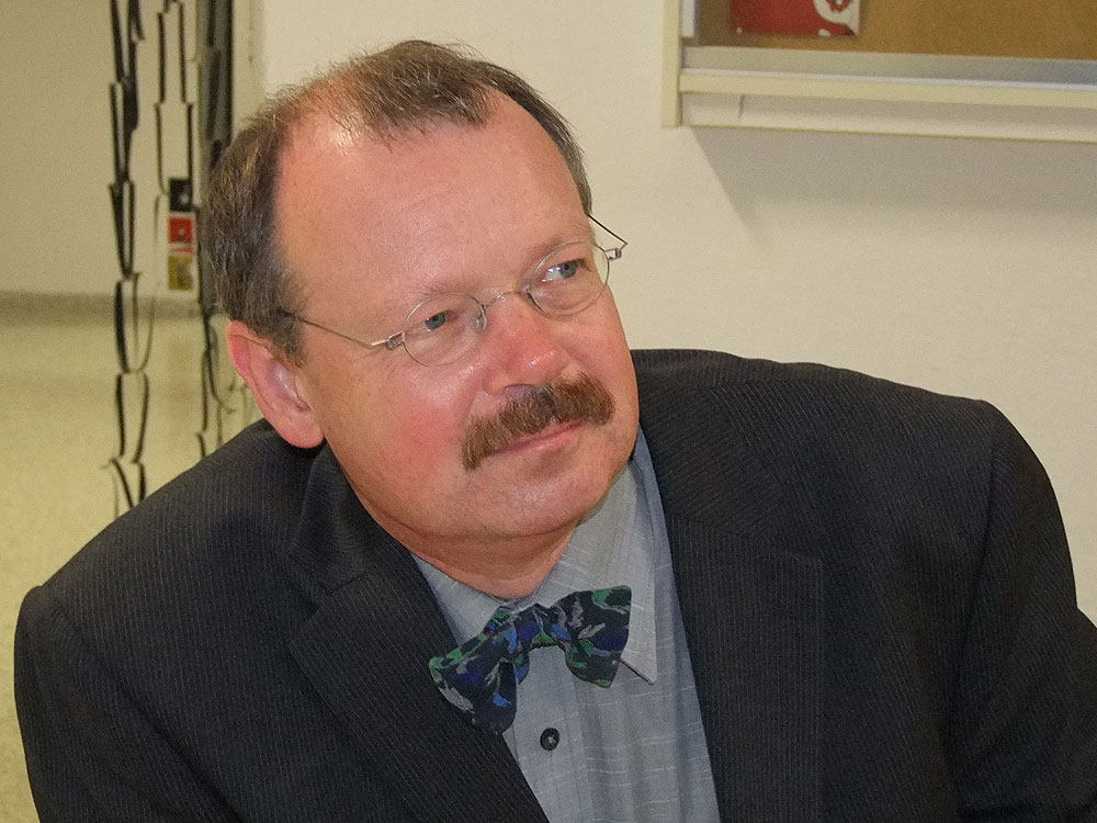 Frank Siegmund auf dem 7. Deutsche Archäologiekongress in Bremen, 3. Oktober 2011